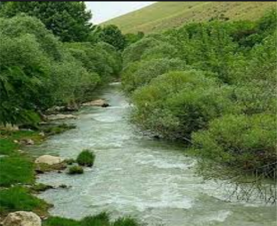 محل زیبا در منطقه شهر ایج فارس به نام رودخانه دائمی رودبال ایج